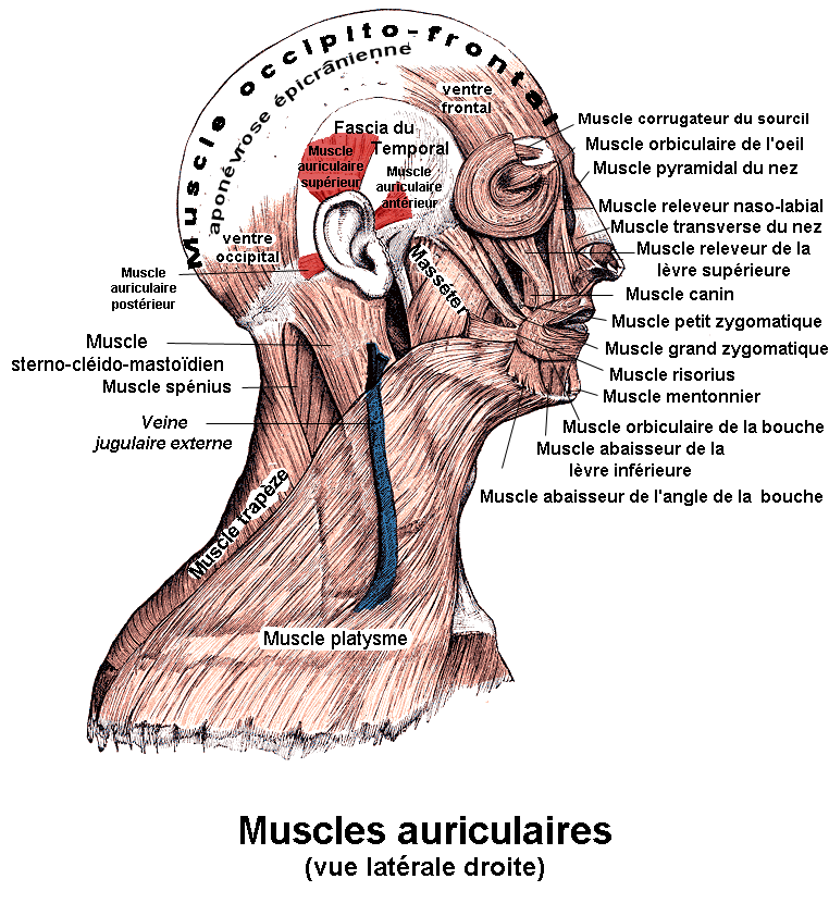 Muscles auriculaires. Anatomie humaine.